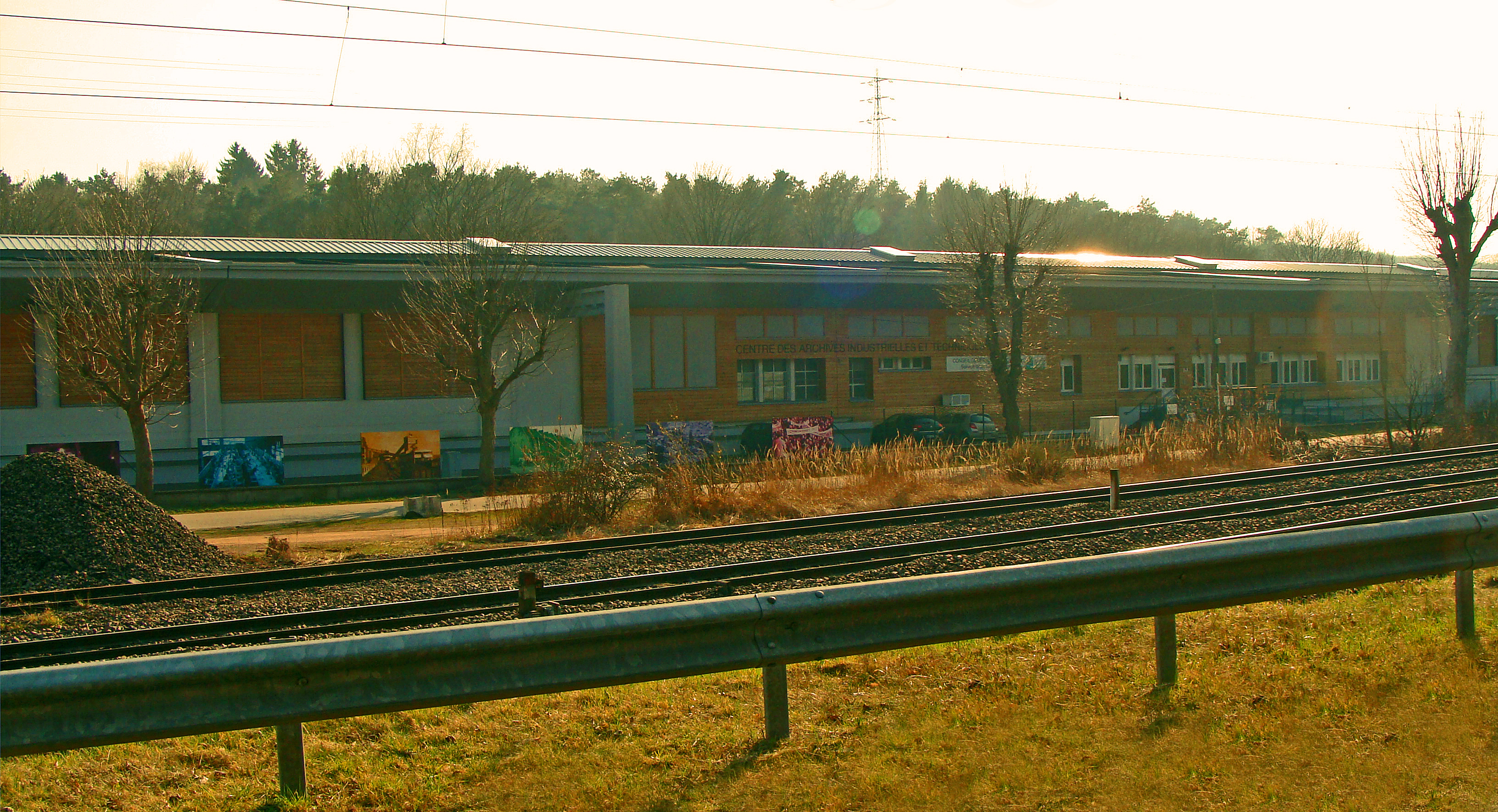 Le Centre des archives industrielles et techniques de la Moselle (CAITM) est un service du conseil général de Moselle. Se situe dans la commune de Saint-Avold. Le bâtiment est un ancien magasin de matériel minier des Houillères du Bassin de Lorraine construit en 1948.